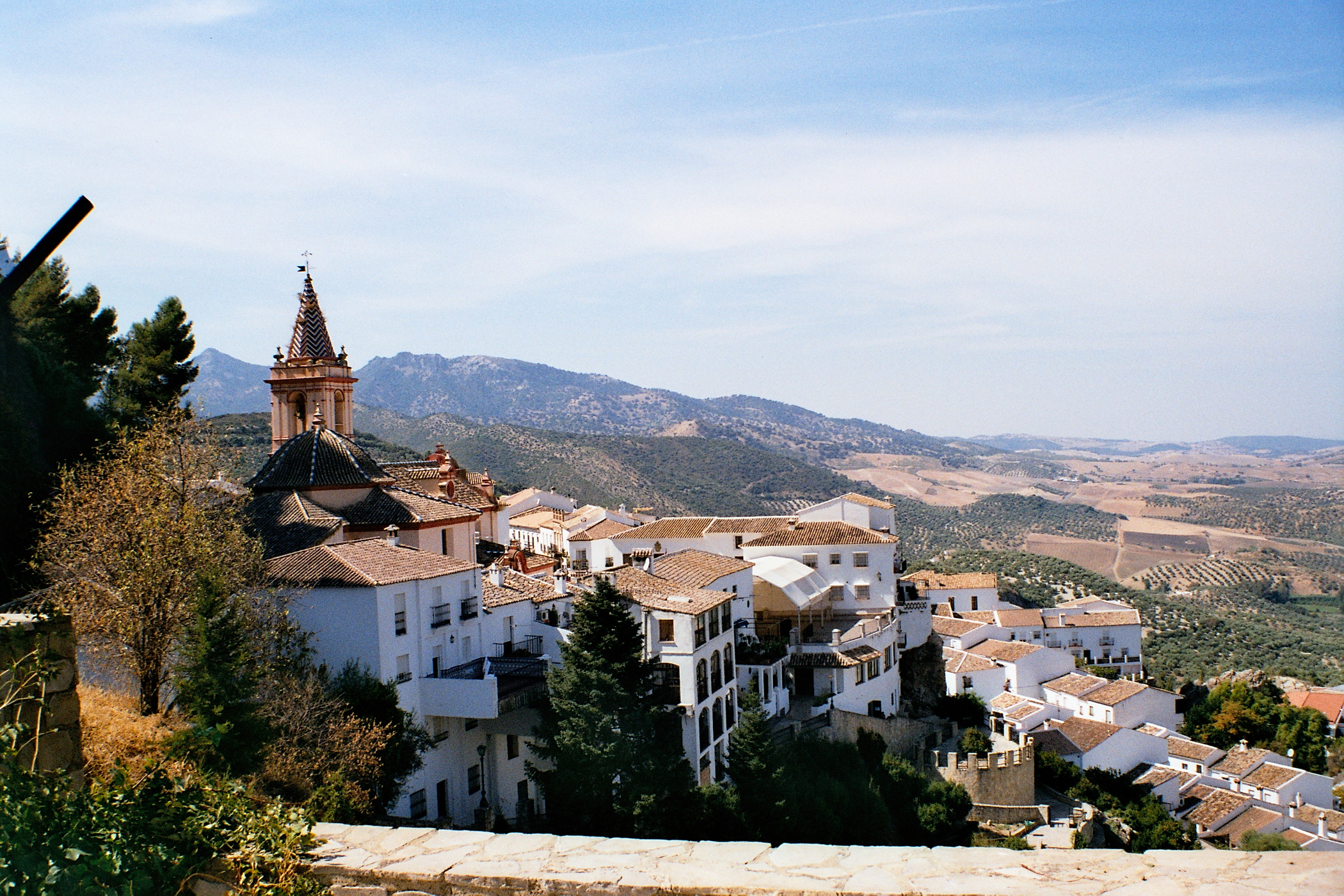 Zahara de la Sierra